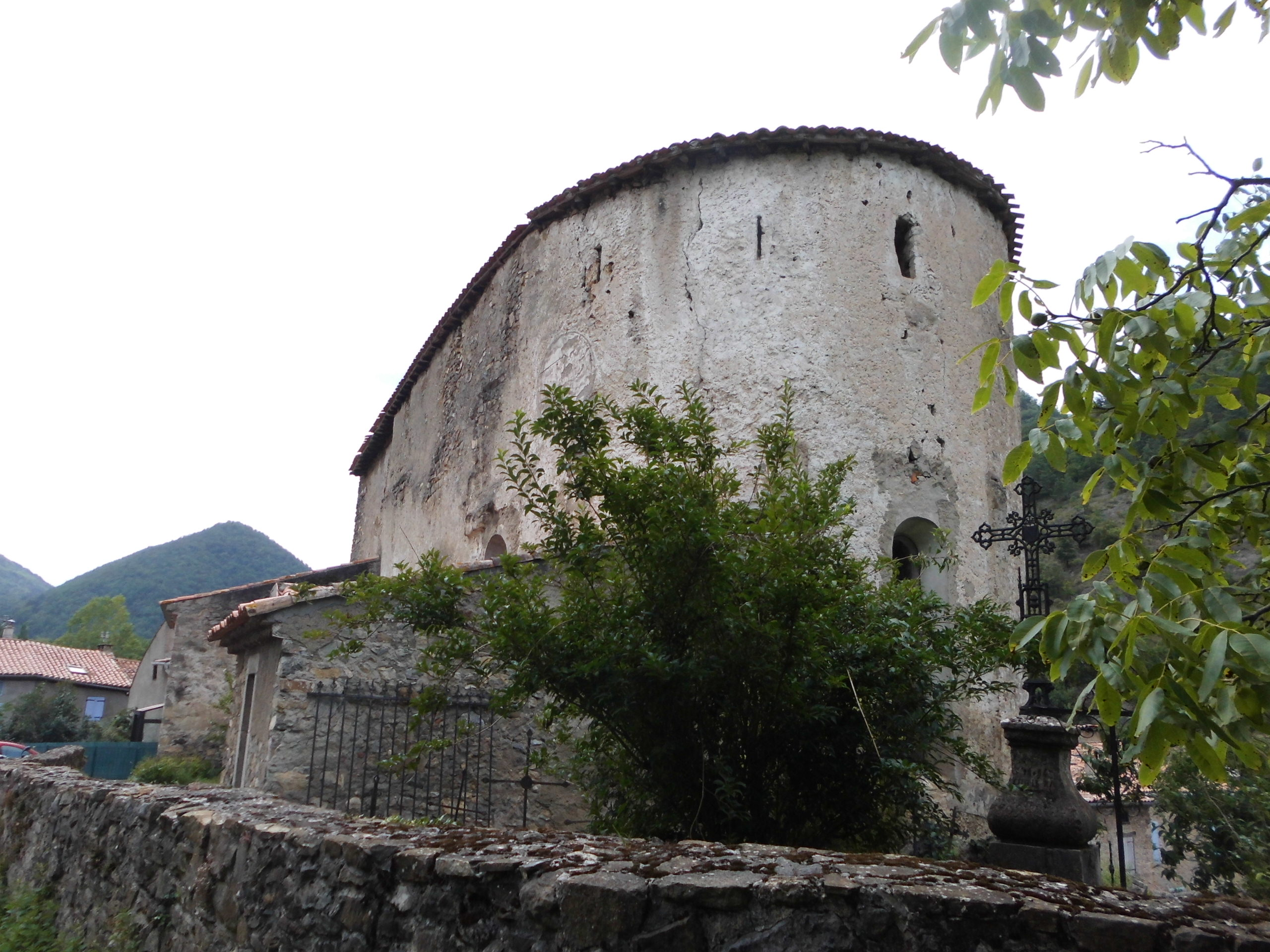 Església parroquial (Marsan) .